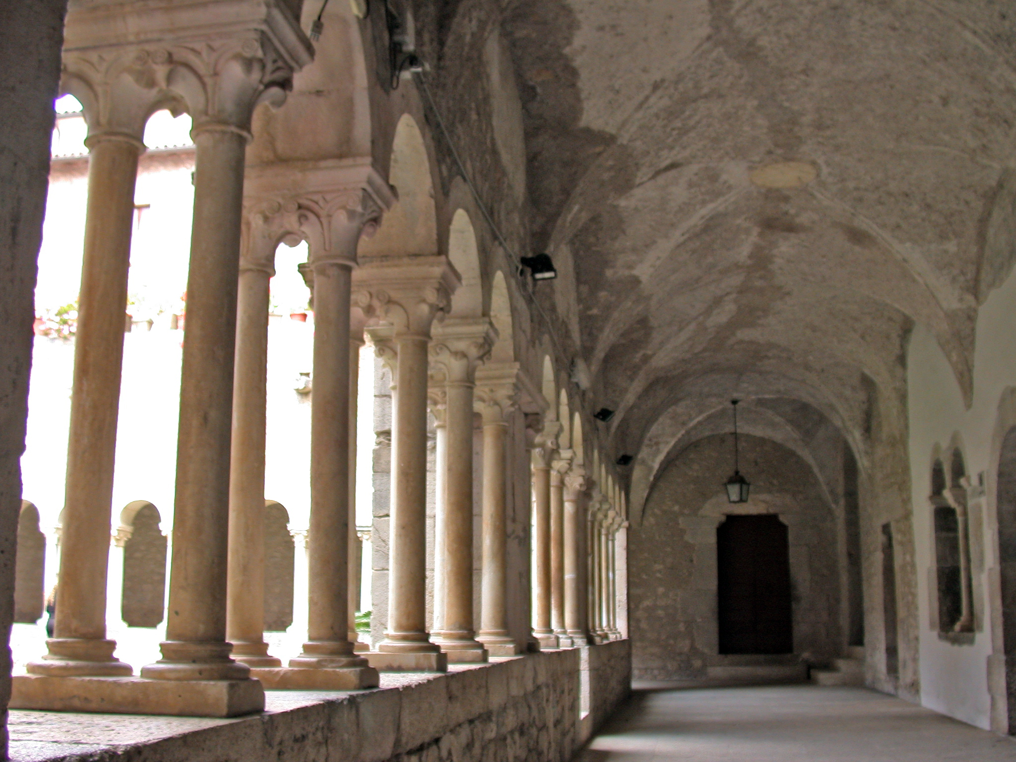 Italia, Lazio, presso Sermoneta (LT), abbazia di Valvisciolo, chiostro, corridoio